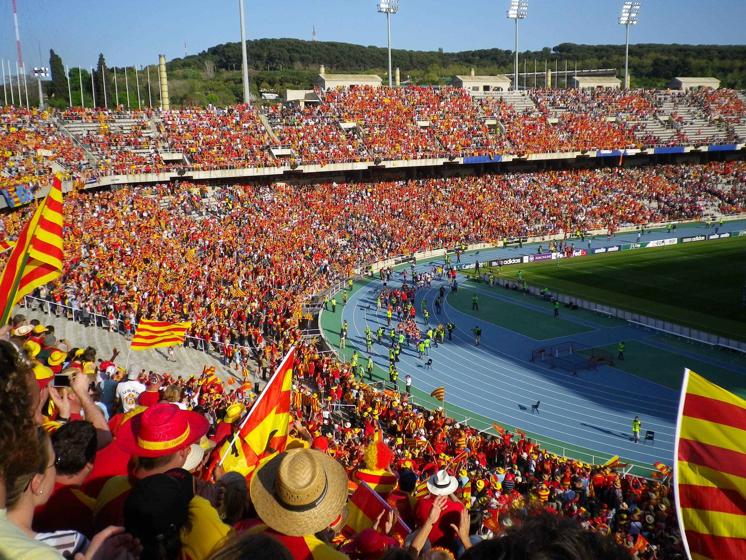 Monjuic, ambé leis afogats de l'USAP Perpinhan Pentax Optio H90